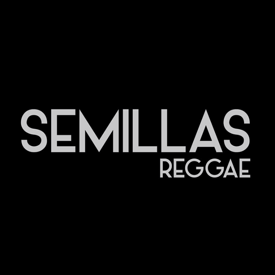 Semillas logo